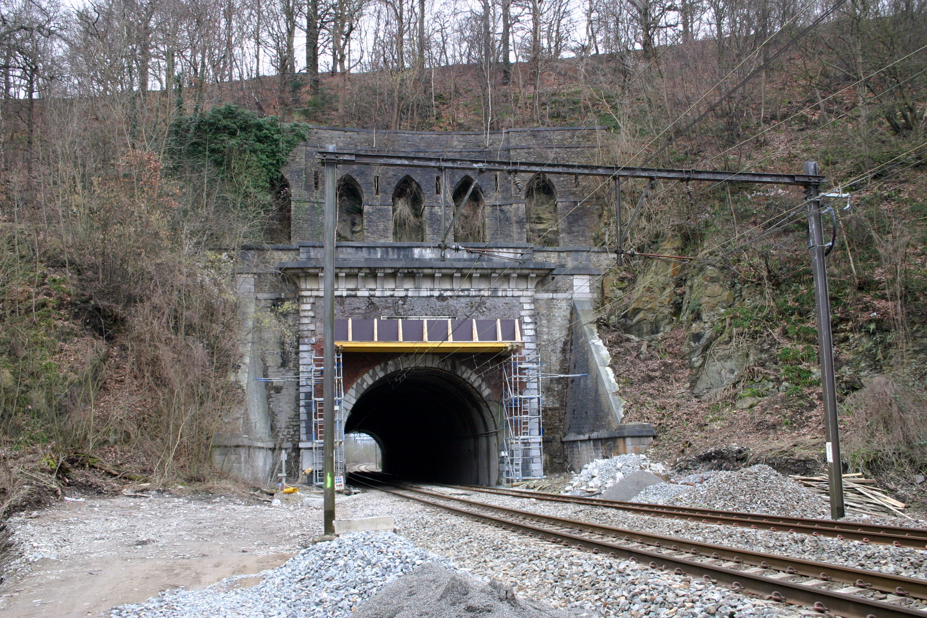 Den Tunnel vu Chaudfontaine am Januar 2008 bei Renovéierungsaarbechten. Kapp Chaudfontaine